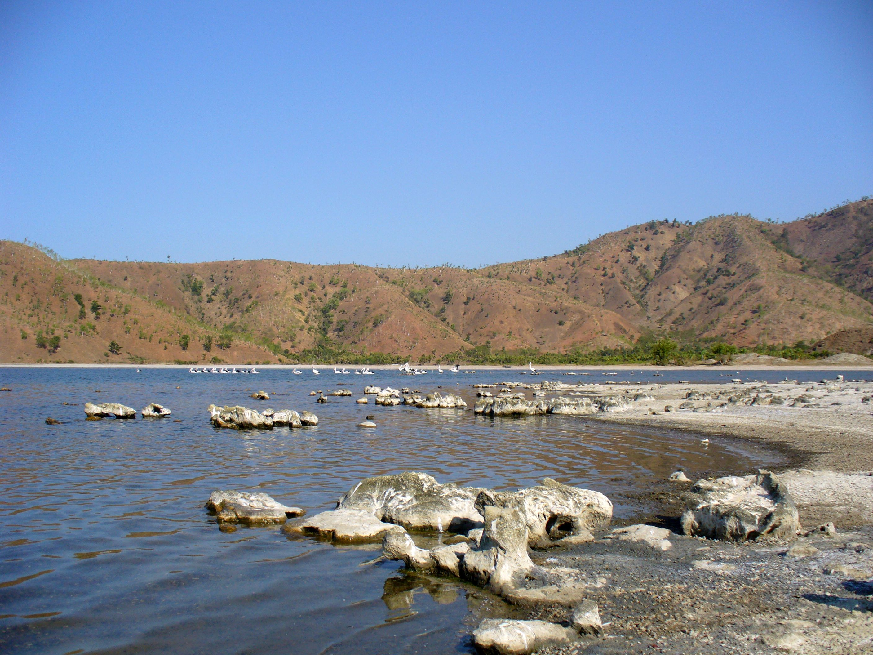 Tasitolu, Dili, East Timor